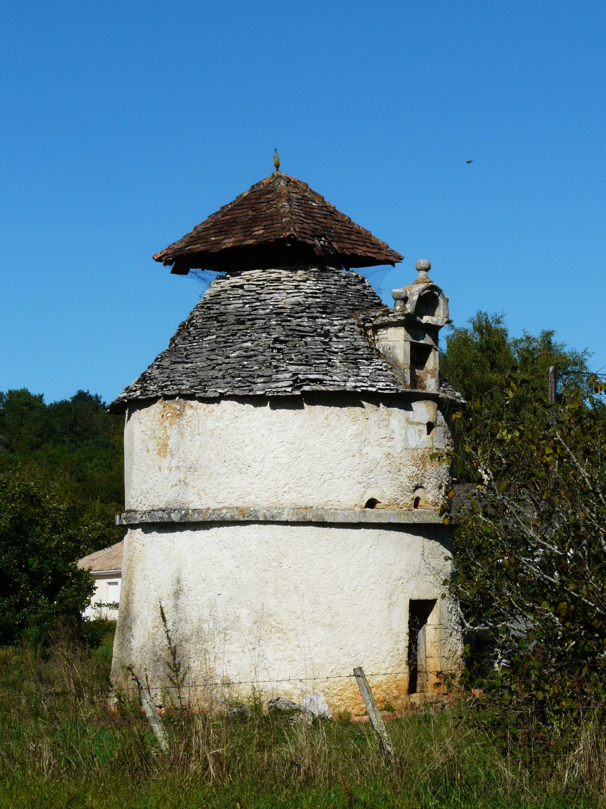 Le pigeonnier de Verdeney, Coulaures, Dordogne, France